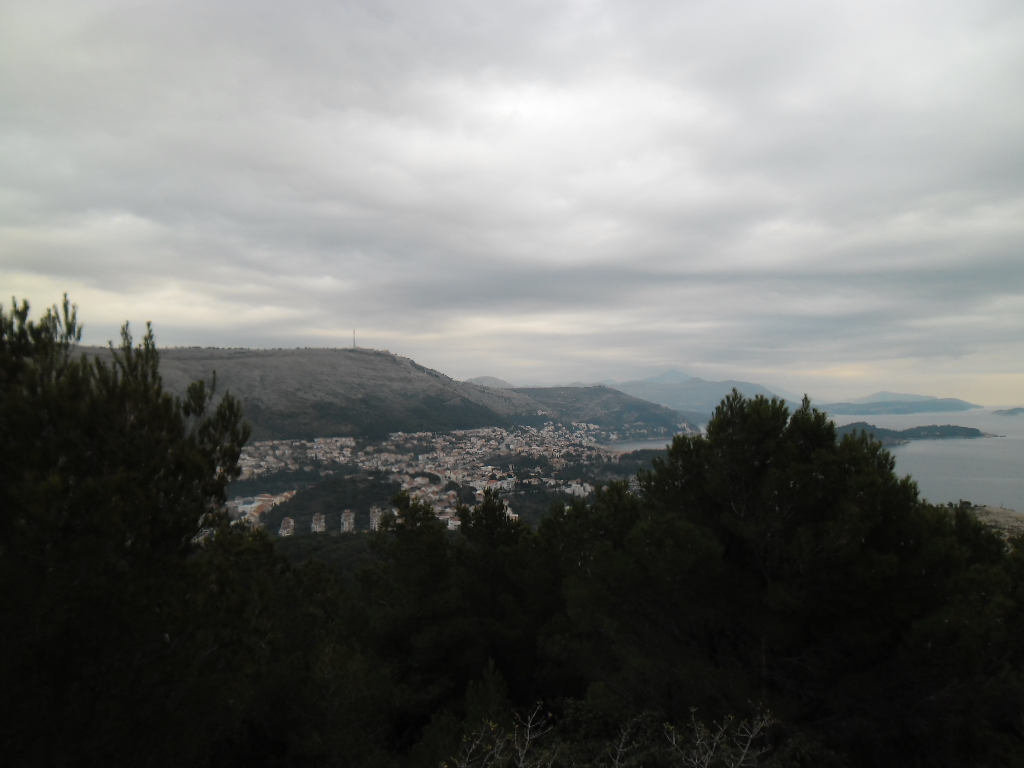 pogled s vrha Petke